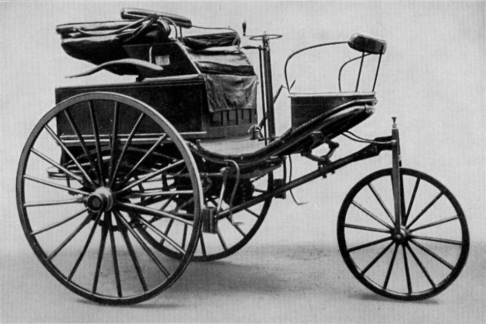 Abb. 27. Mein erster Serienwagen von 1888. 1,5 PS, 2 Geschwindigkeiten bis zirka 16km/Std., damaliger Preis 3000 Mark